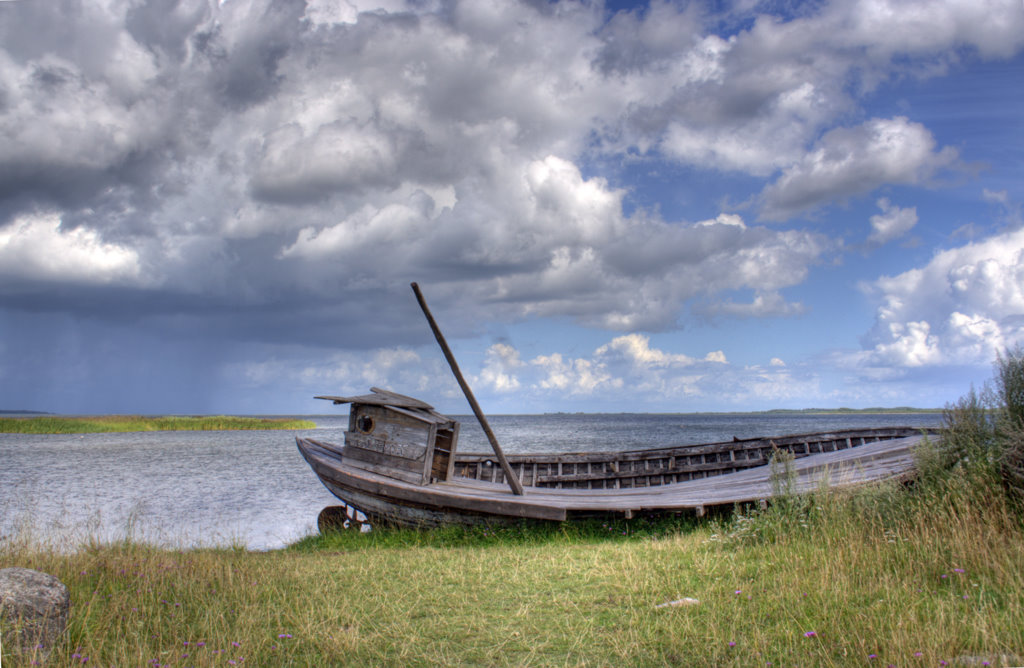 Paadivrakk Saaremaal.